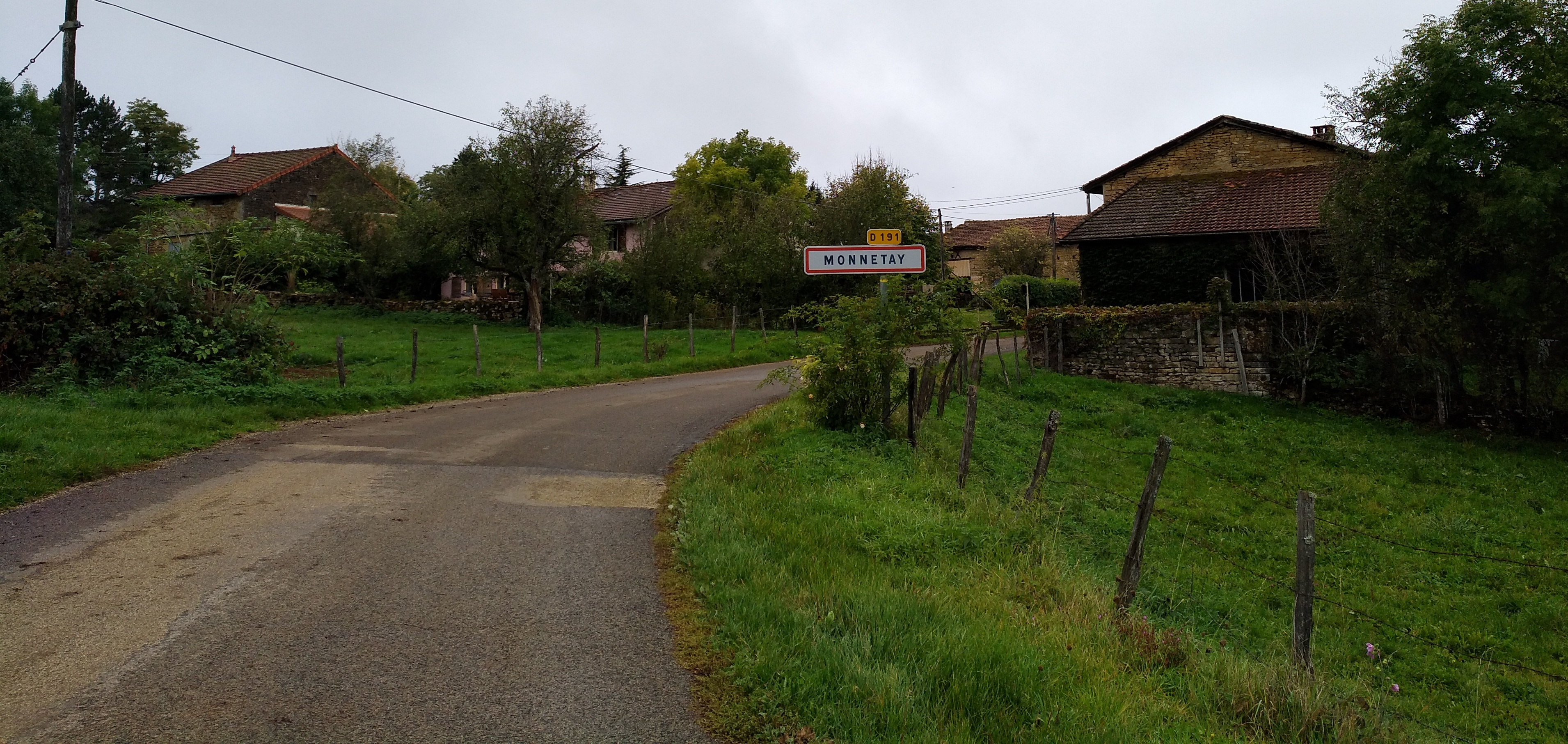 Entrée du village de Monnetay (Jura, France), sur la route départementale 191.